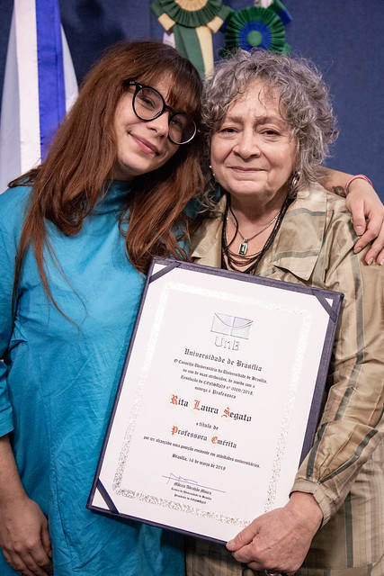 Cerimônia de outorga do título de professor emérito à professora Rita Segato. Distinção foi aprovada na 449ª reunião do Consuni, em março de 2018.